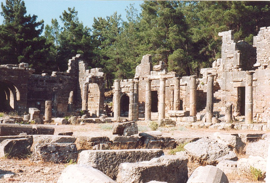 Seleukia (Pamphylien) - Agora